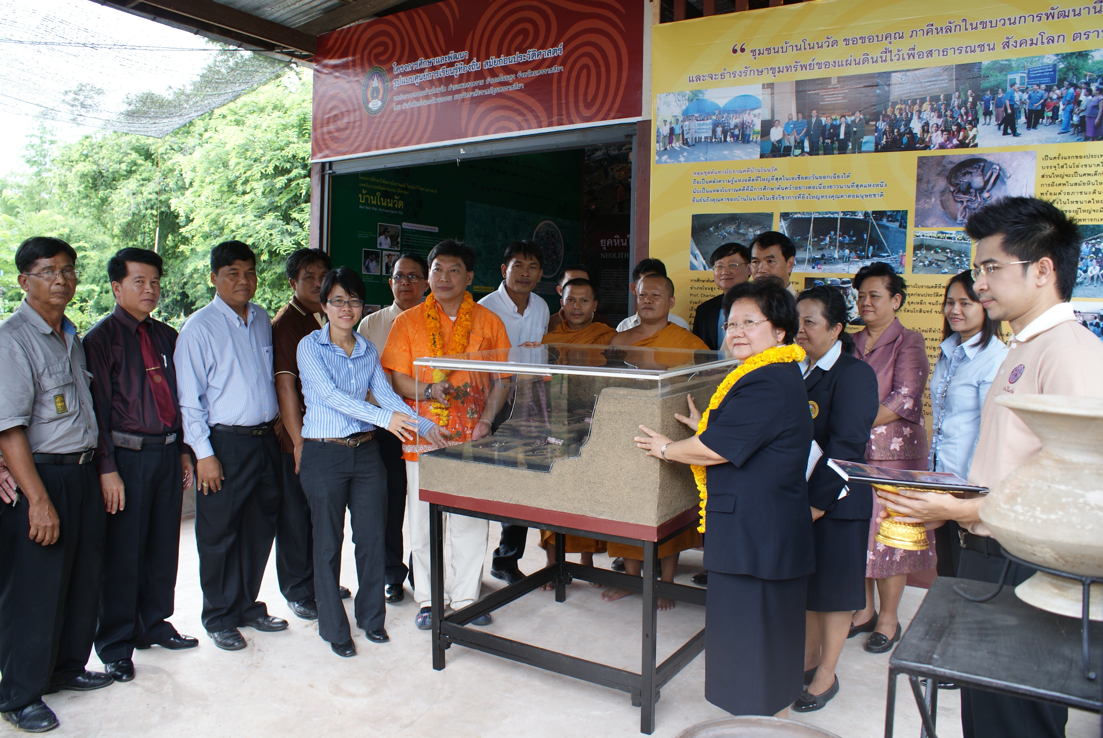 พิธีเปิดอาคารชั่วคราว บ้านโนนวัด